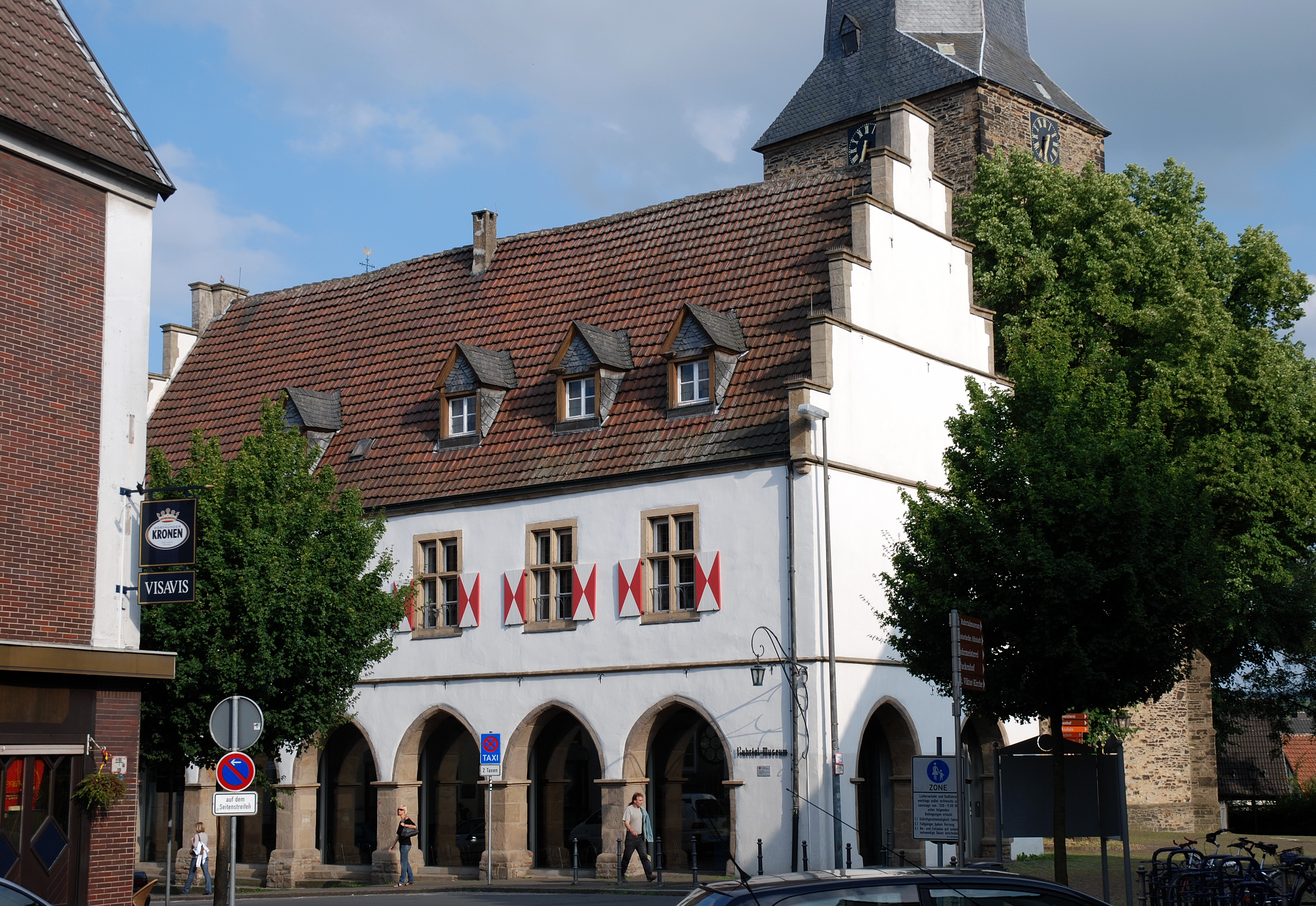 Schwerte, Altes Rathaus, heute Ruhrtalmuseum, Blick von Nordwesten